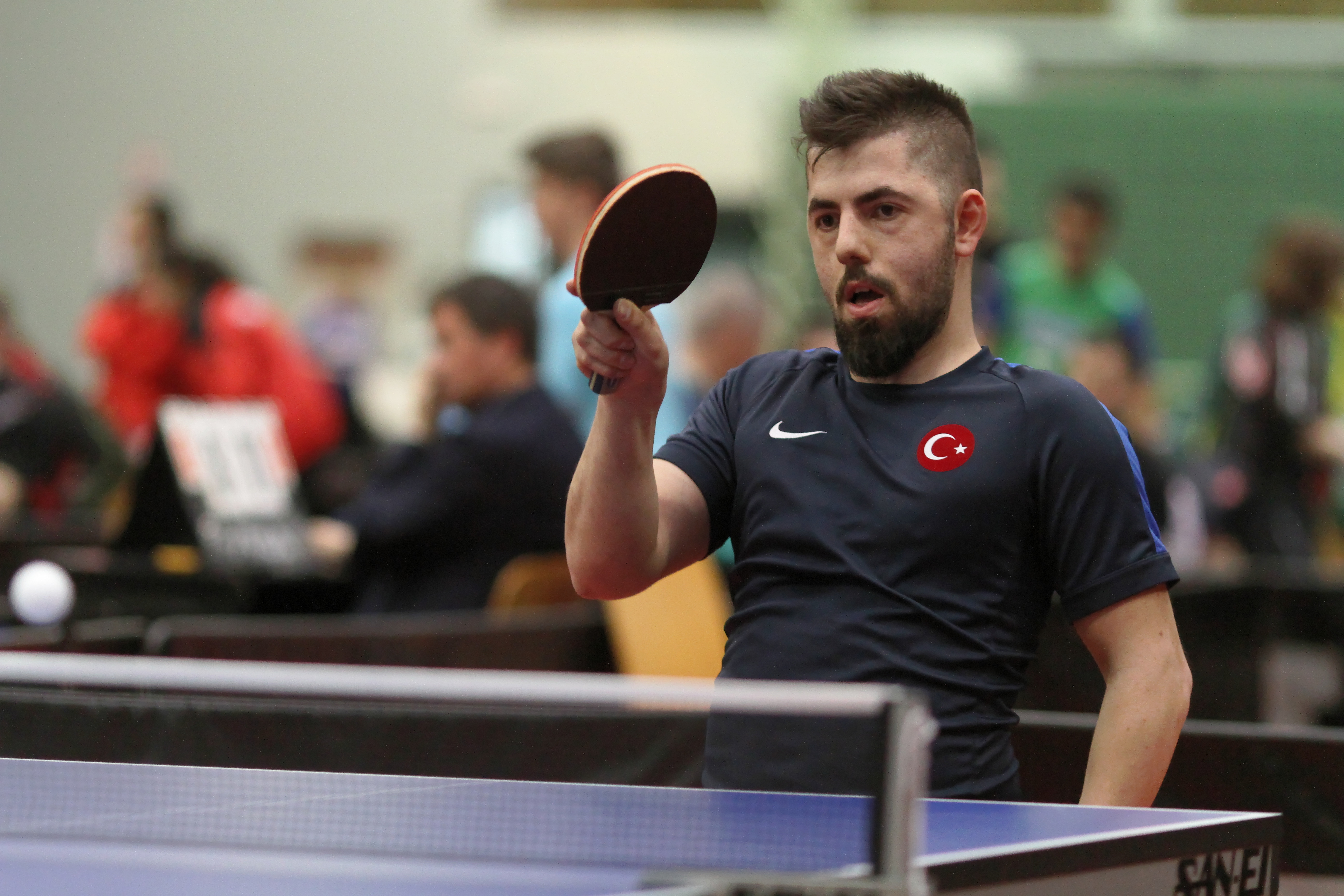 Ali Öztürk lors de l'Open de Slovénie 2012